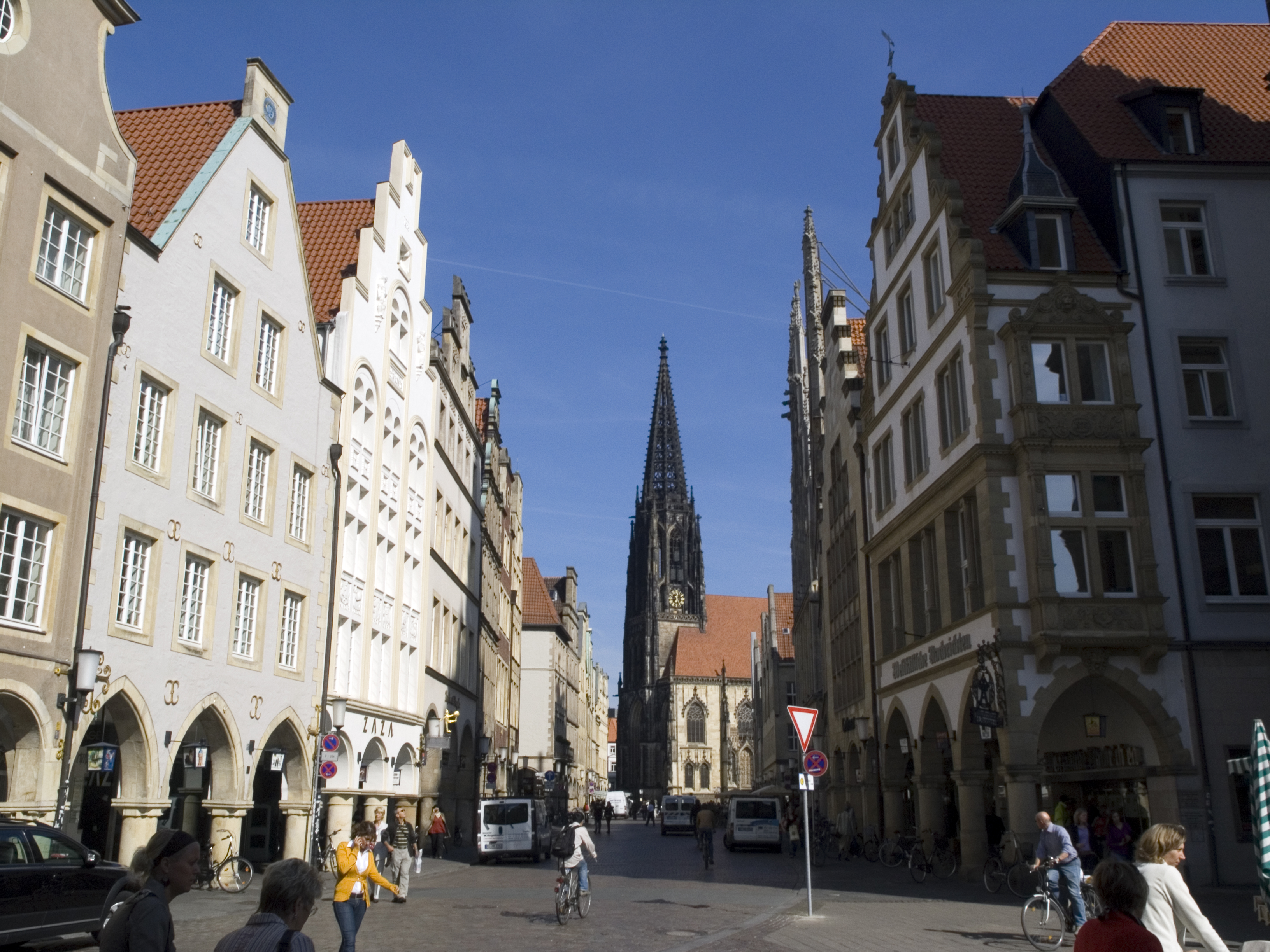 Северный Рейн - Вестфалия, Мюнстер - Принципальмаркт